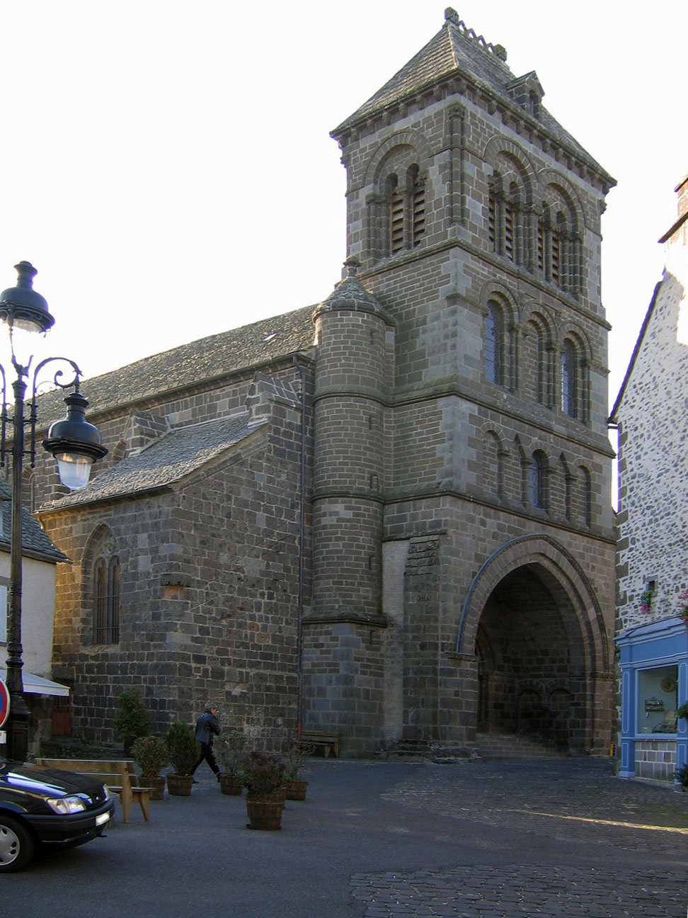 Salers, Kirche St. Mathieu. andere Versionen: keine